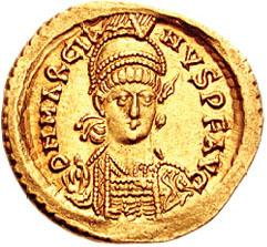 Emperor Marcian